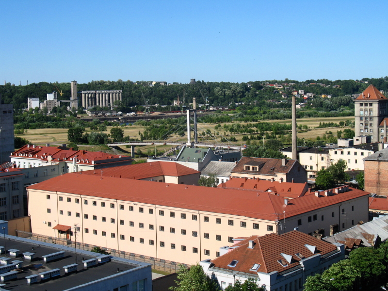 Kauno tardymo izoliatorius, Nemuno sala, Freda.